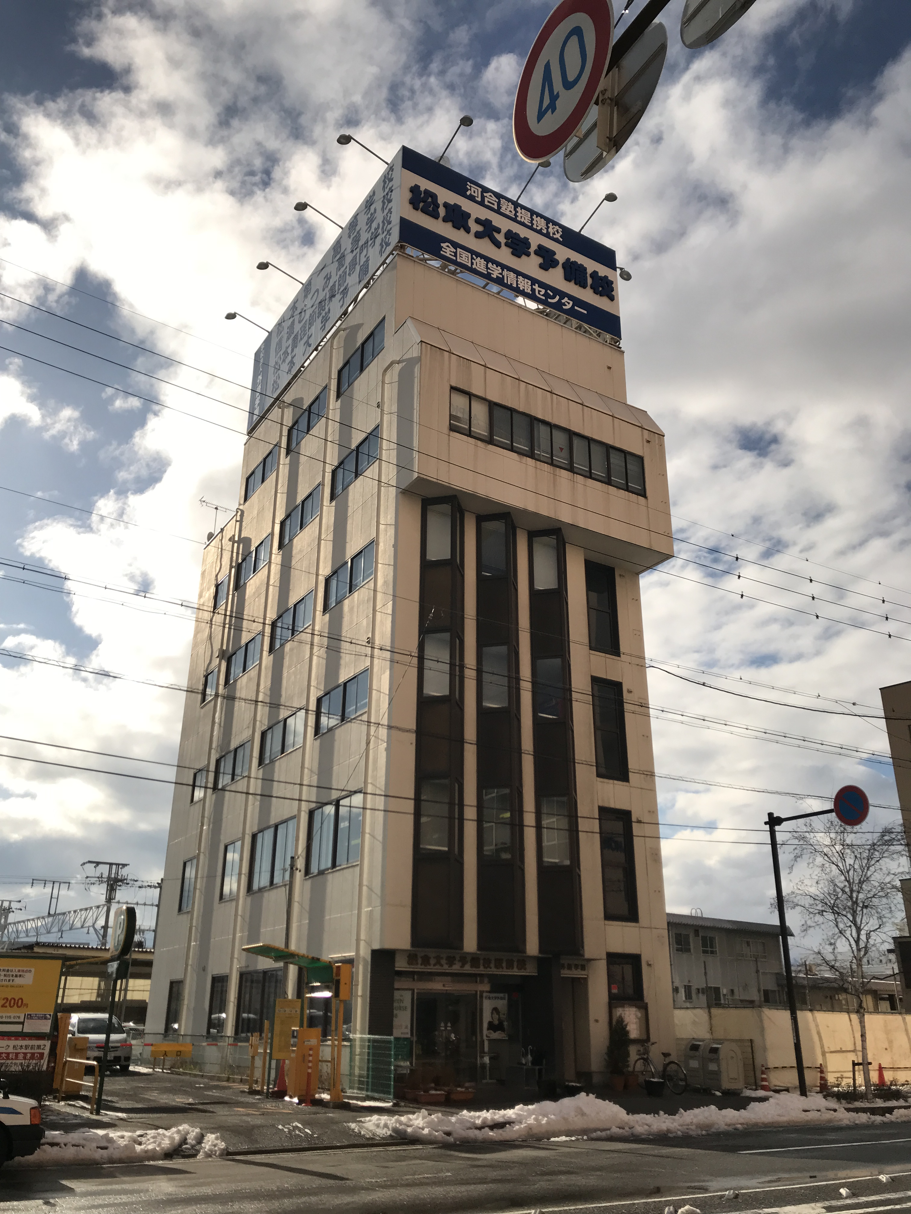 松本大学予備校松本駅前校舎。